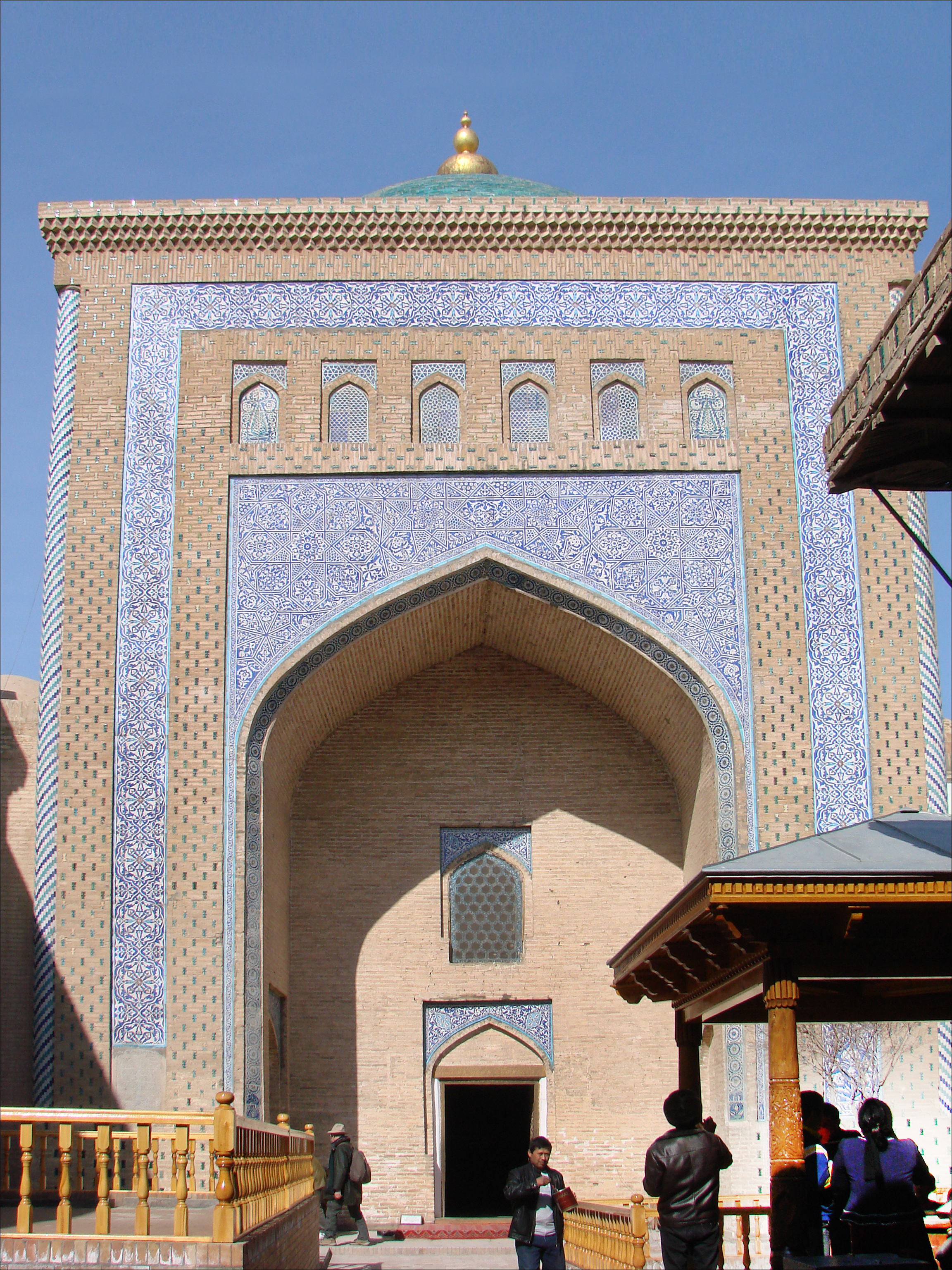 Pakhlavan Makhmoud (1247-1325) est le saint patron de la ville de Khiva. Son tombeau a été construit a l'emplacement de son atelier de fourreur, le métier qu'il exerçait, puis a été inclue en 1810 dans le mausolée dynastique des Khans Kungrad. Ce bâtiment à double coupole bleue turquoise est un des symboles de Khiva L'intérieur de la Khanaka est décoré de majoliques bleues et blanches, réalisées par Abdoullah Djinn. Les tombes des Khans Abdoul Gazi (1663), Anoucha (1681) et Muhammad Rakhim sont placées dans la Khanaka. Au premier plan, à droite, un puits où viennent boire les jeunes mariés désirant un enfant. Cette pratique se poursuit encore aujourd'hui.